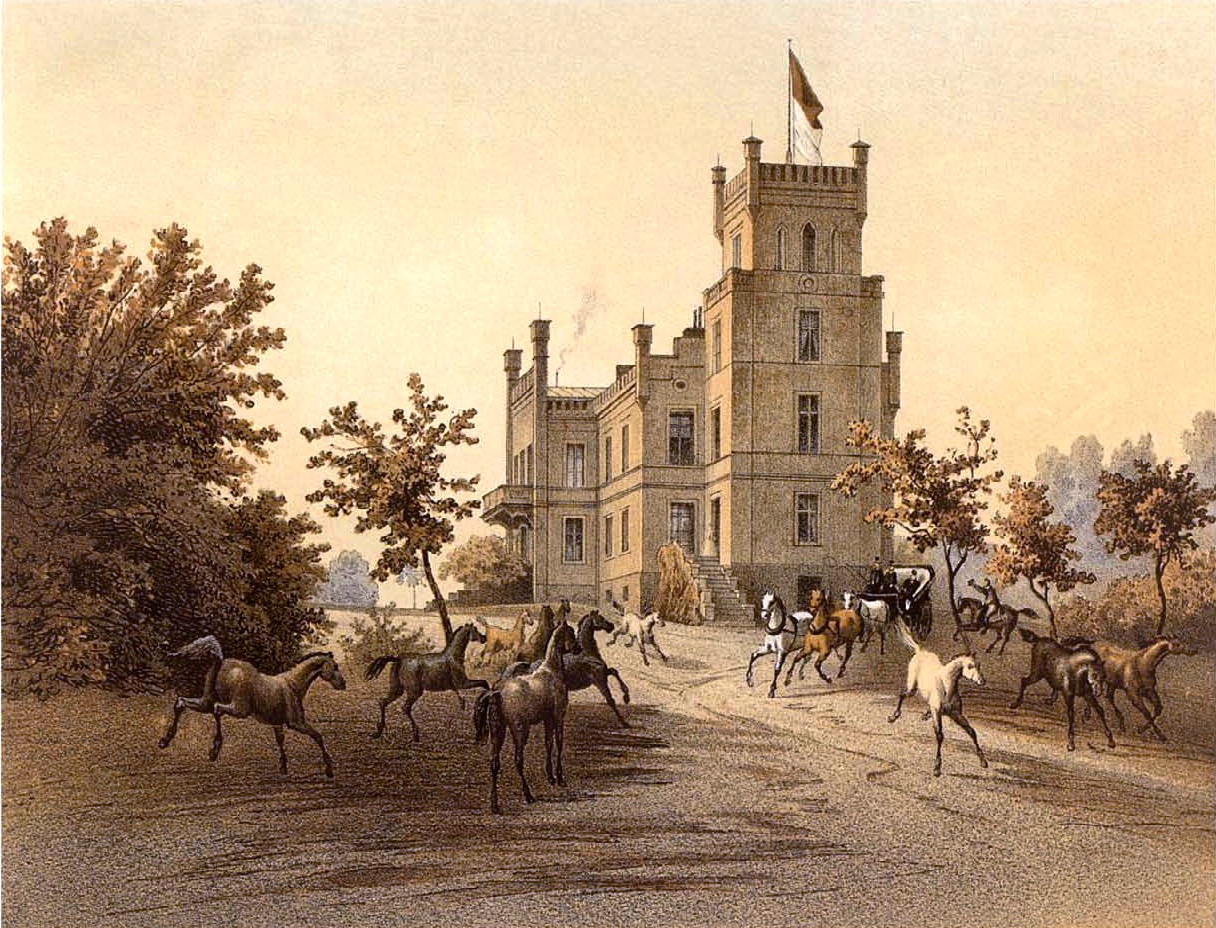 Rittergut Strzelewo, Kreis Bromberg, Provinz Posen